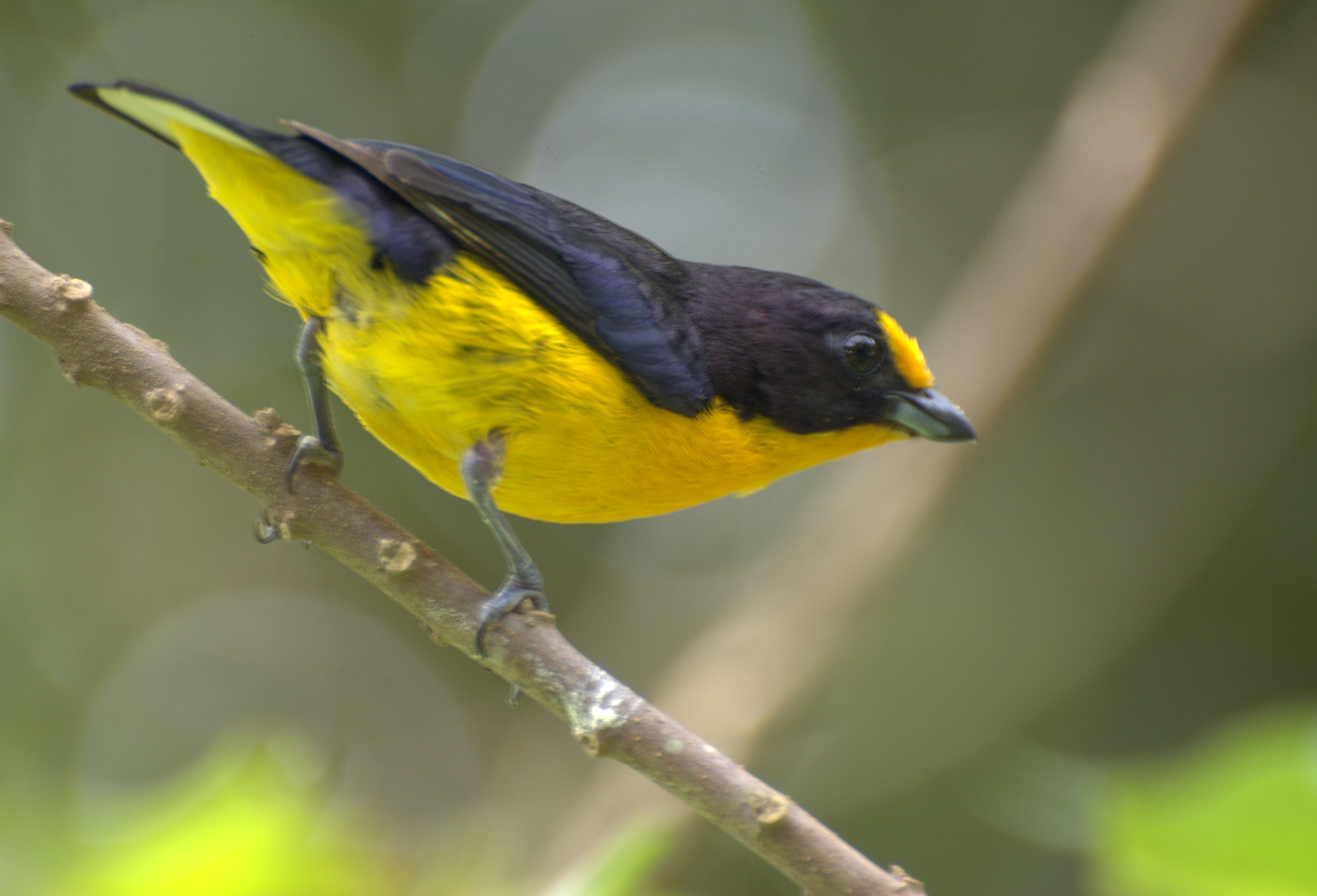 Euphonia violacea No quintal da casa da minha sogra na cidade de Registro-SP